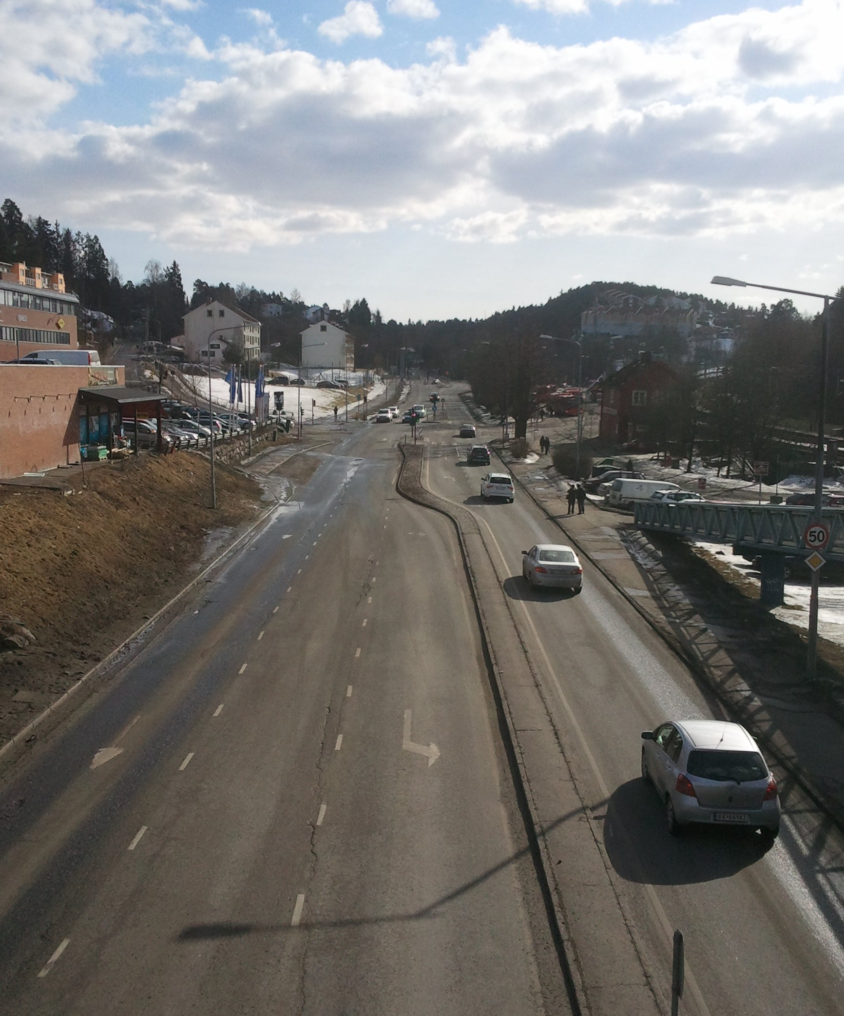 Nedre Prinsals vei i Oslo ved Hauketo, mot sør.